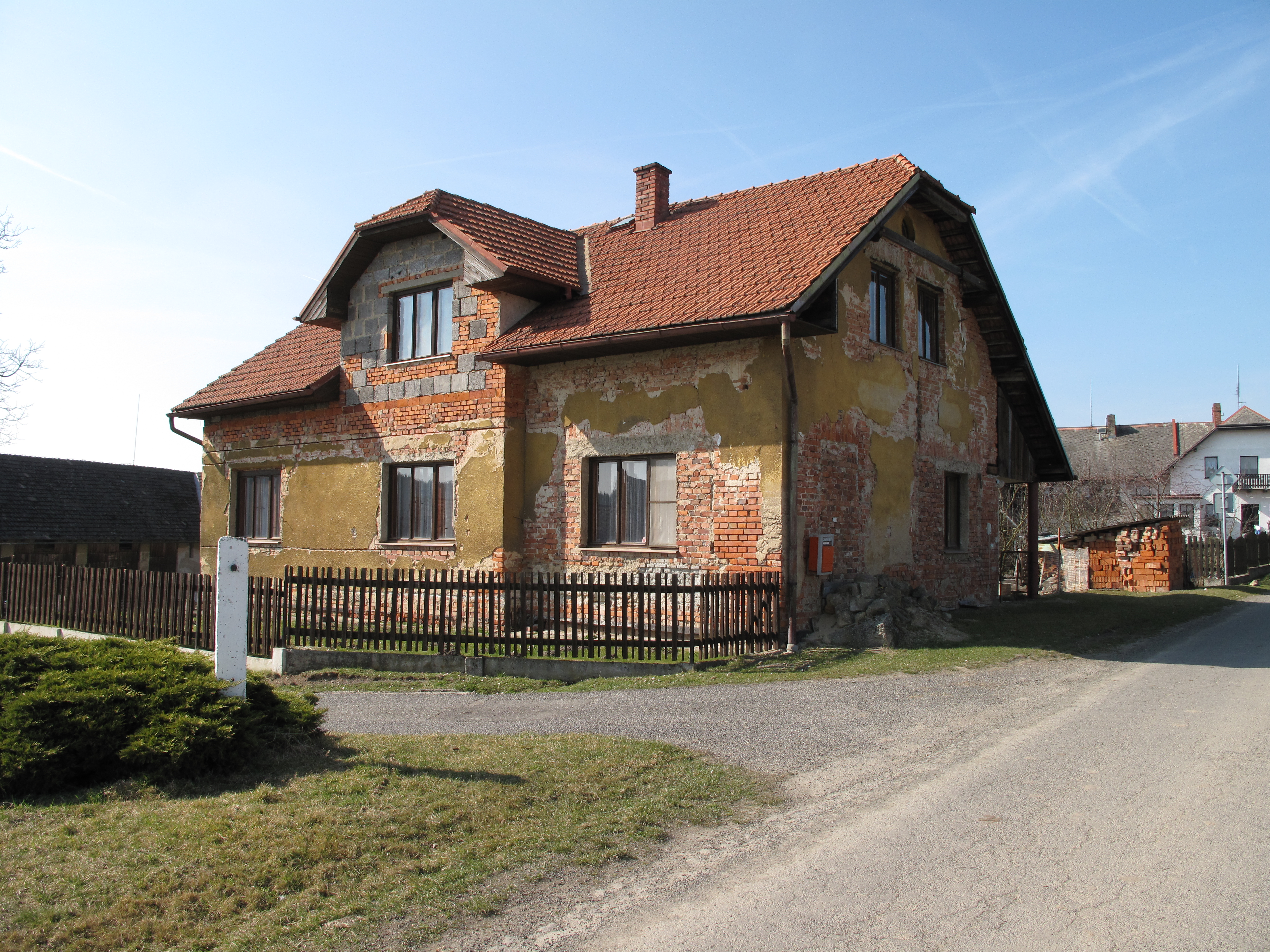 Dům v Březové. Okres Liberec, Česká republika.